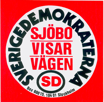 Klistermärke från Sverigedemokraterna med "Sjöbo visar vägen".